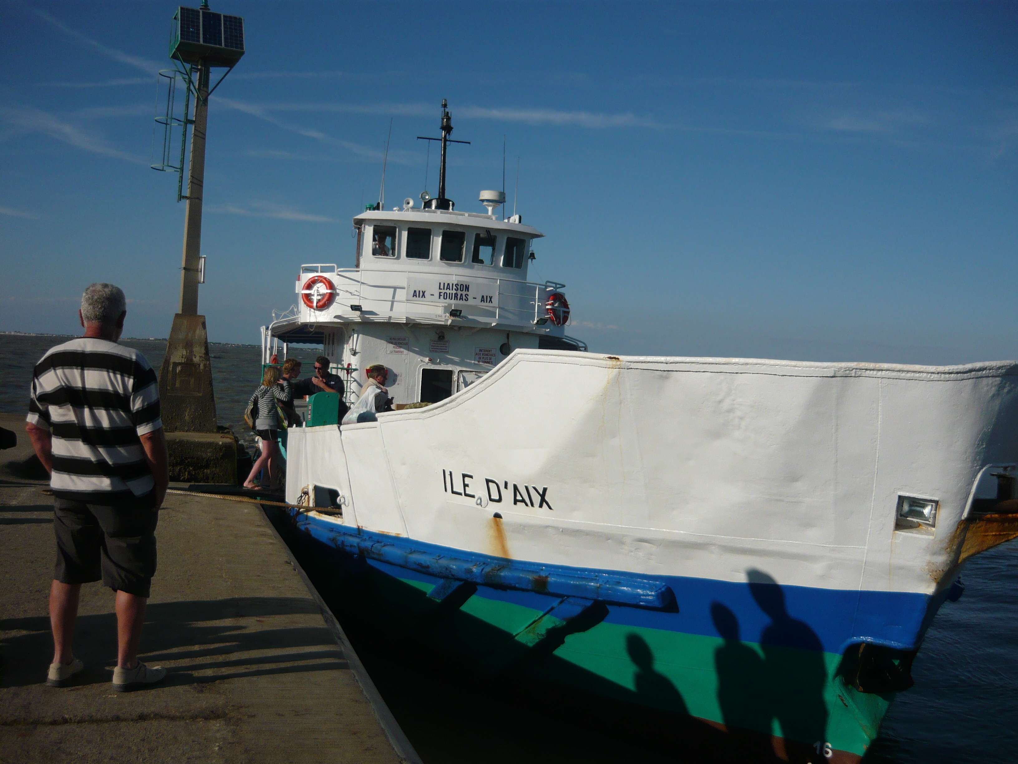 La Pointe de la Fumée à Fouras est le principal débarcadère pour la liaison maritime Île-d'Aix - Fouras.